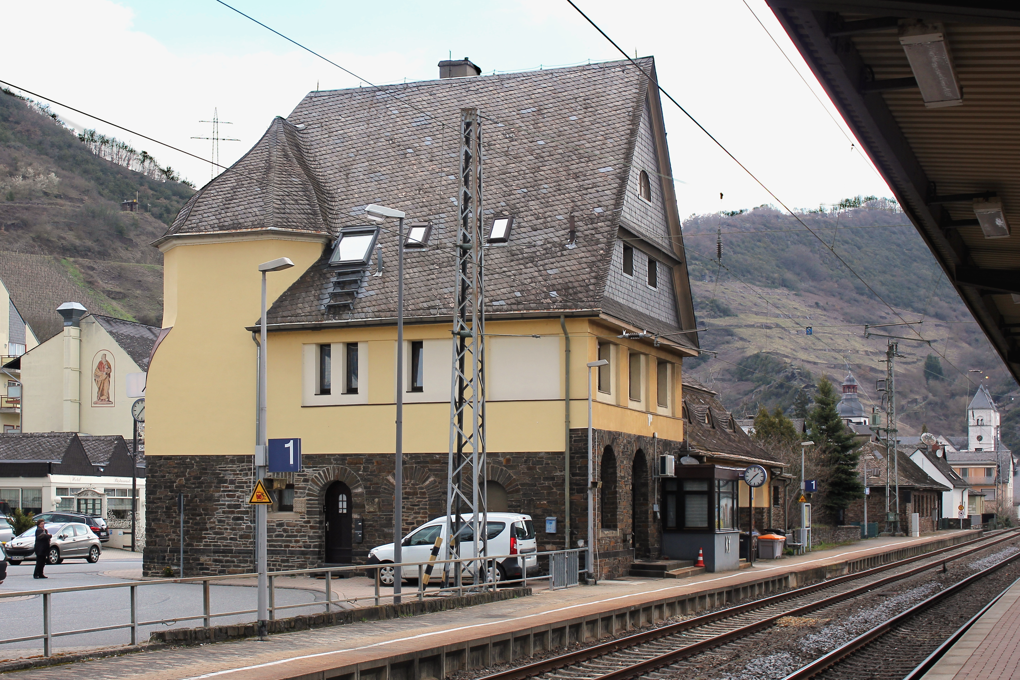 Bahnhof von Treis-Karden, Südost